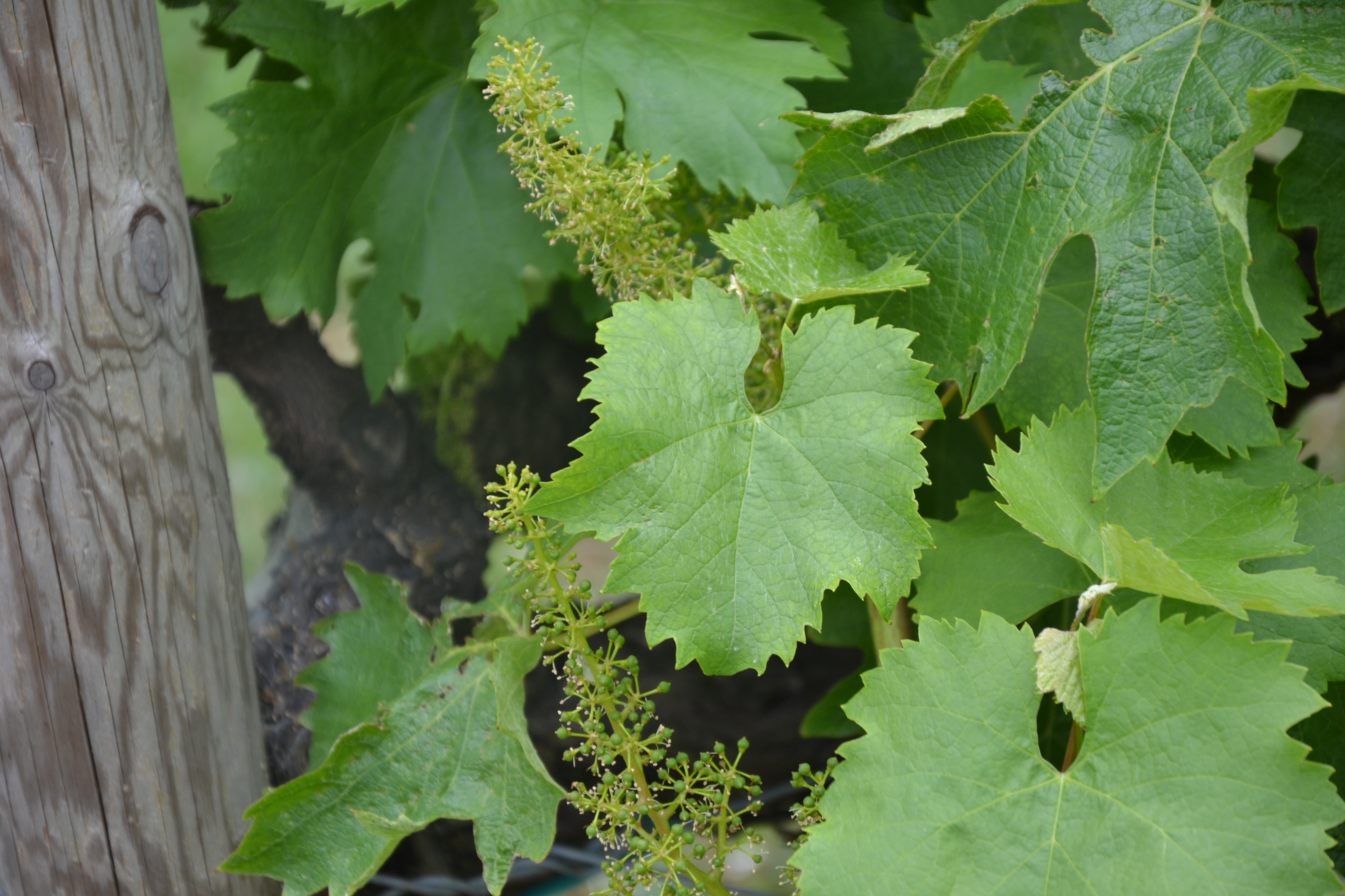 feuilles de cépage grolleau gris